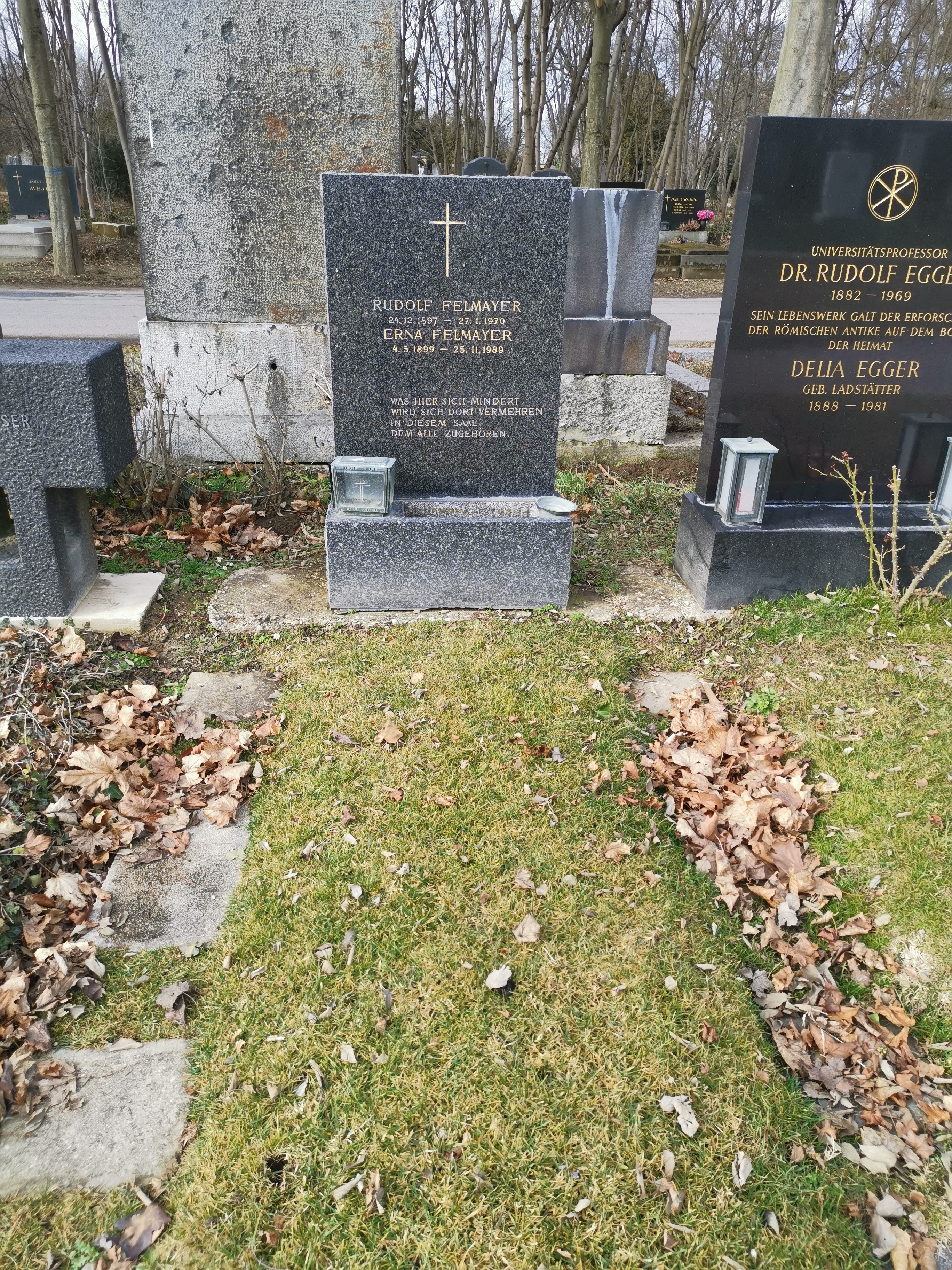 Grab von Rudolf Felmayer auf dem Wiener Zentralfriedhof